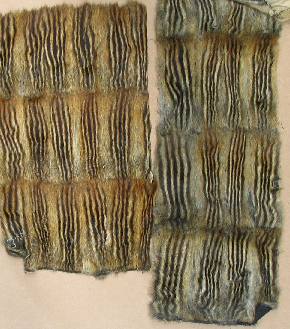 Burunduk skins (Siberian chipmunk). Burundukifelle (Art des Streifenhörnchens), 2 Teile verschiedener Felltafeln für Pelzzwecke. In Firma Pelzmodelle Kuhn, Düsseldorf